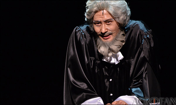 뮤지컬 벽을 뚫는 남자 프레스콜